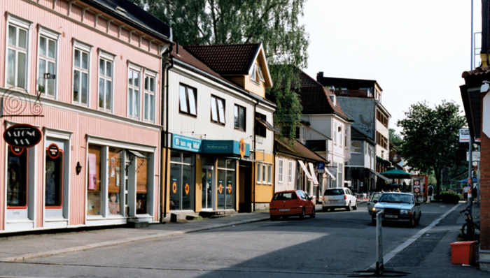 Jernbanegata, Sarpsborg.